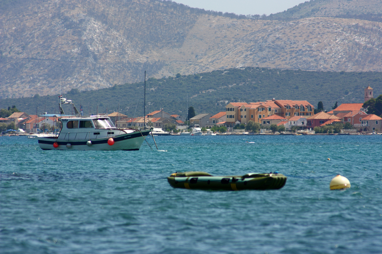 Brodarica